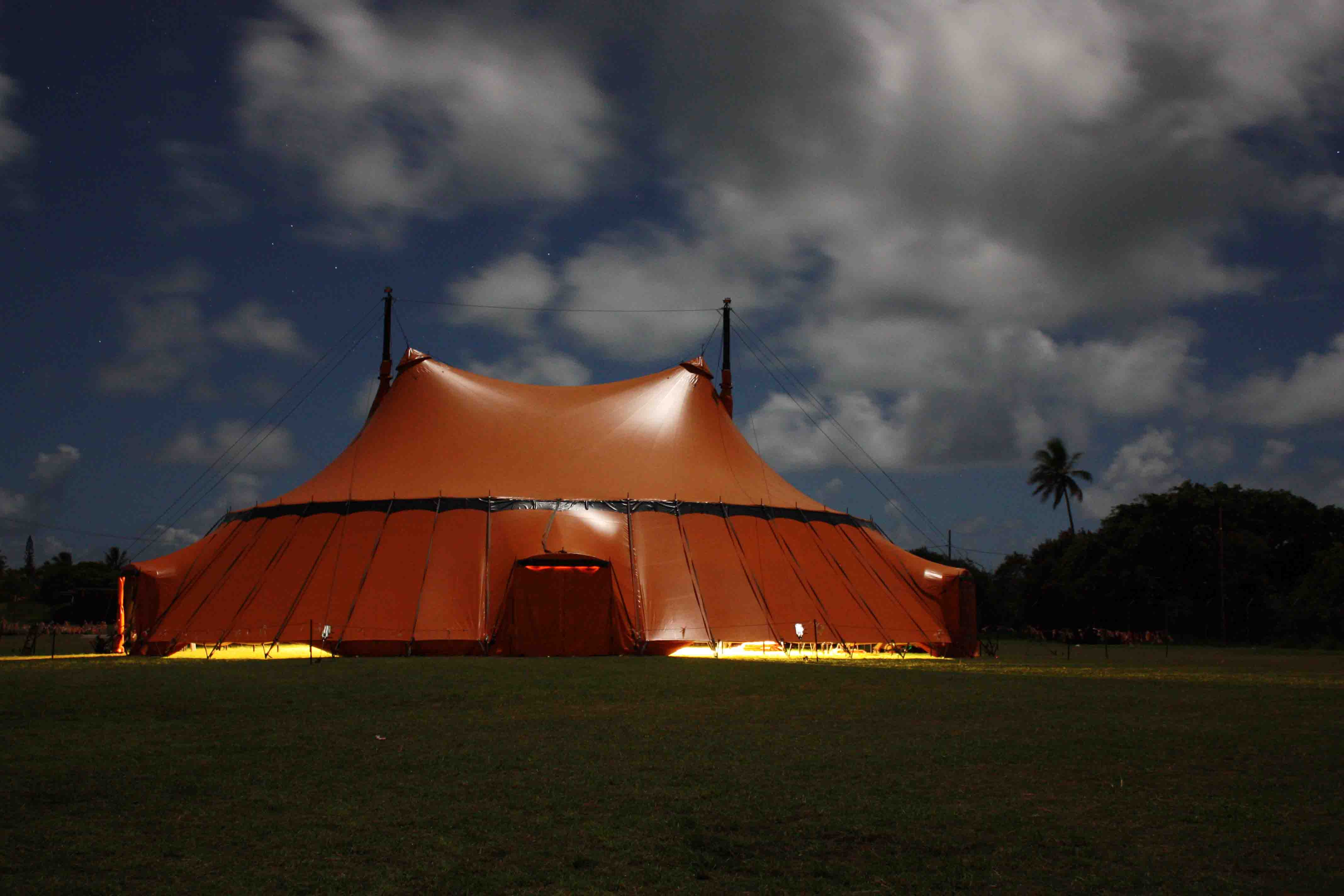 le Chapitô de Nouvelle-Calédonie, implanté à l'île des pins en 2011